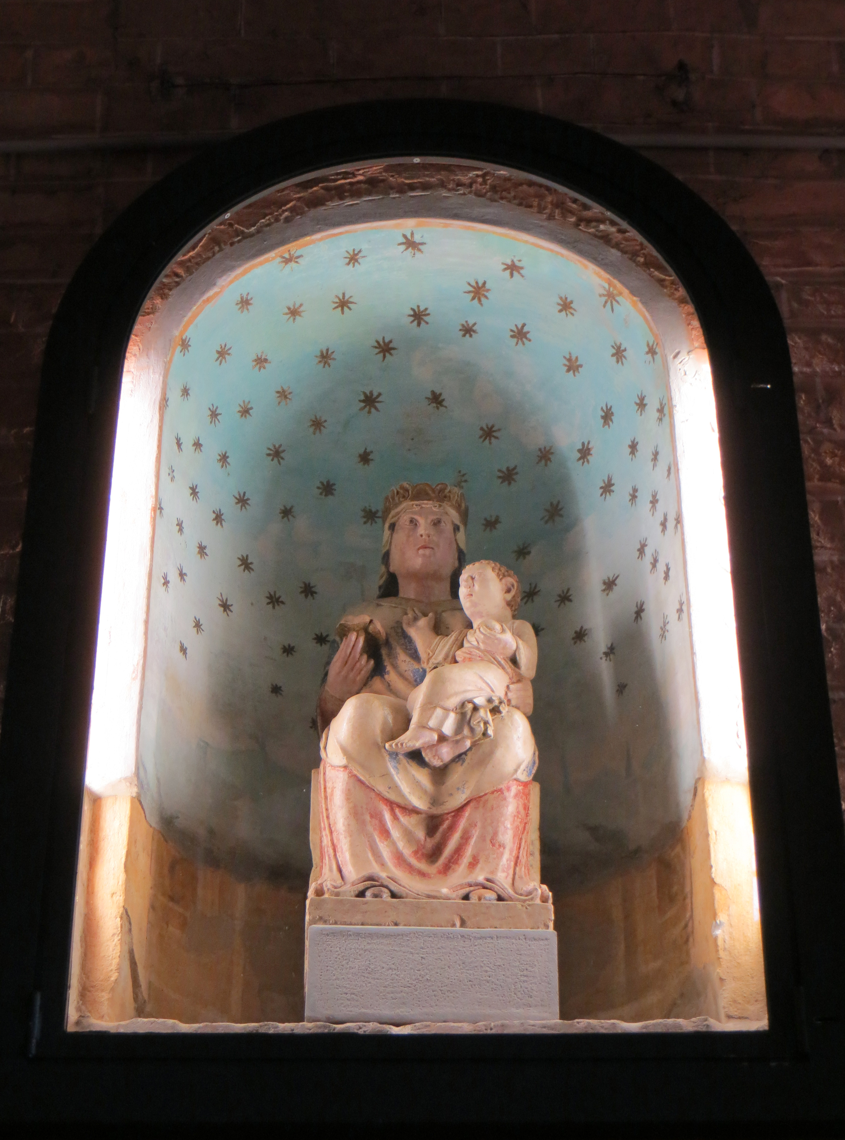 Abbazia di San Bernardo (Fontevivo) - Madonna col Bambino (Antelami)